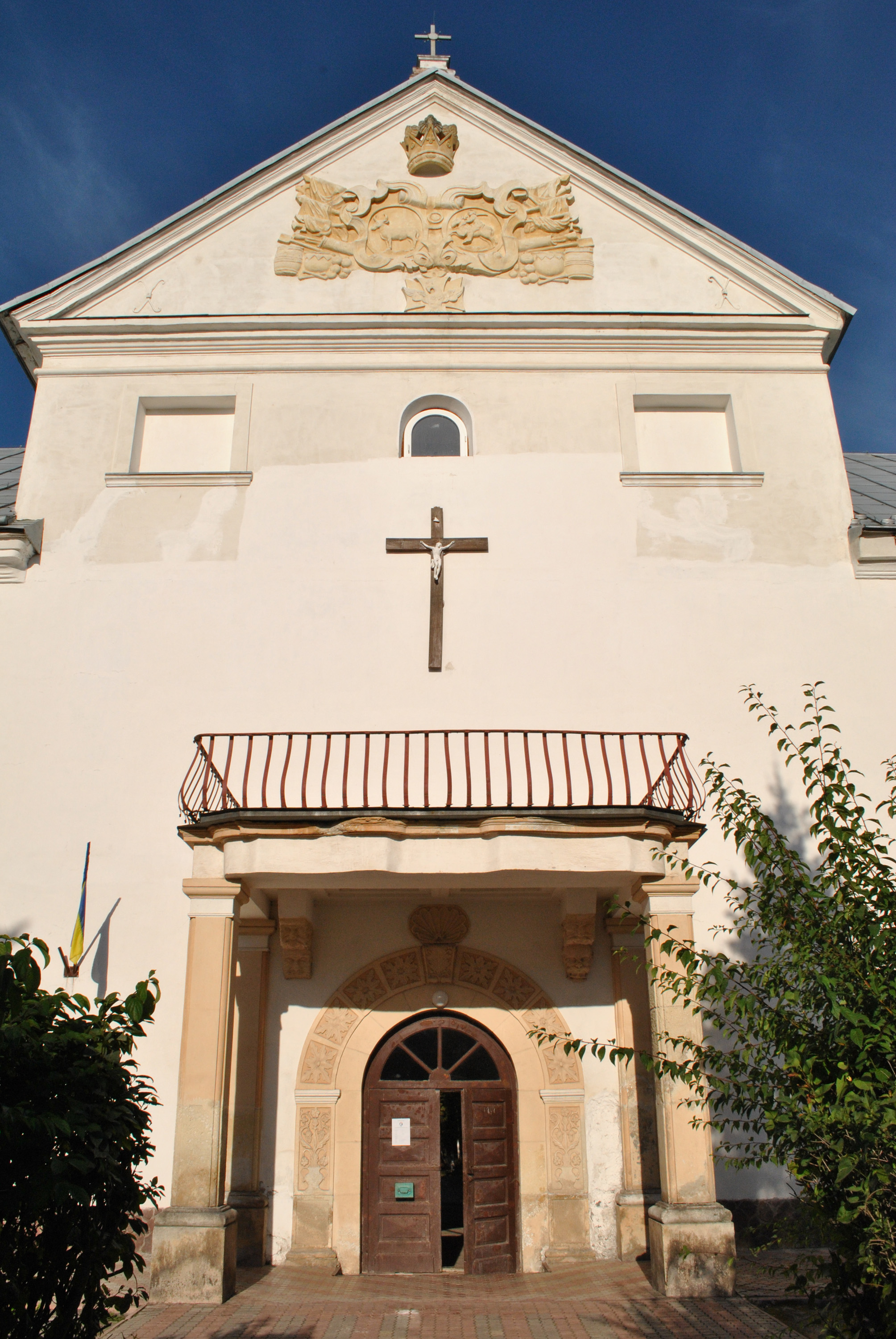 Палац XVII-XVIII ст. (мур.) у селі Язловець Бучацького району Тернопільської області. Центральний портал: вид із внутрішнього боку палацу з виходом до парку.